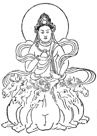 日天のイラスト